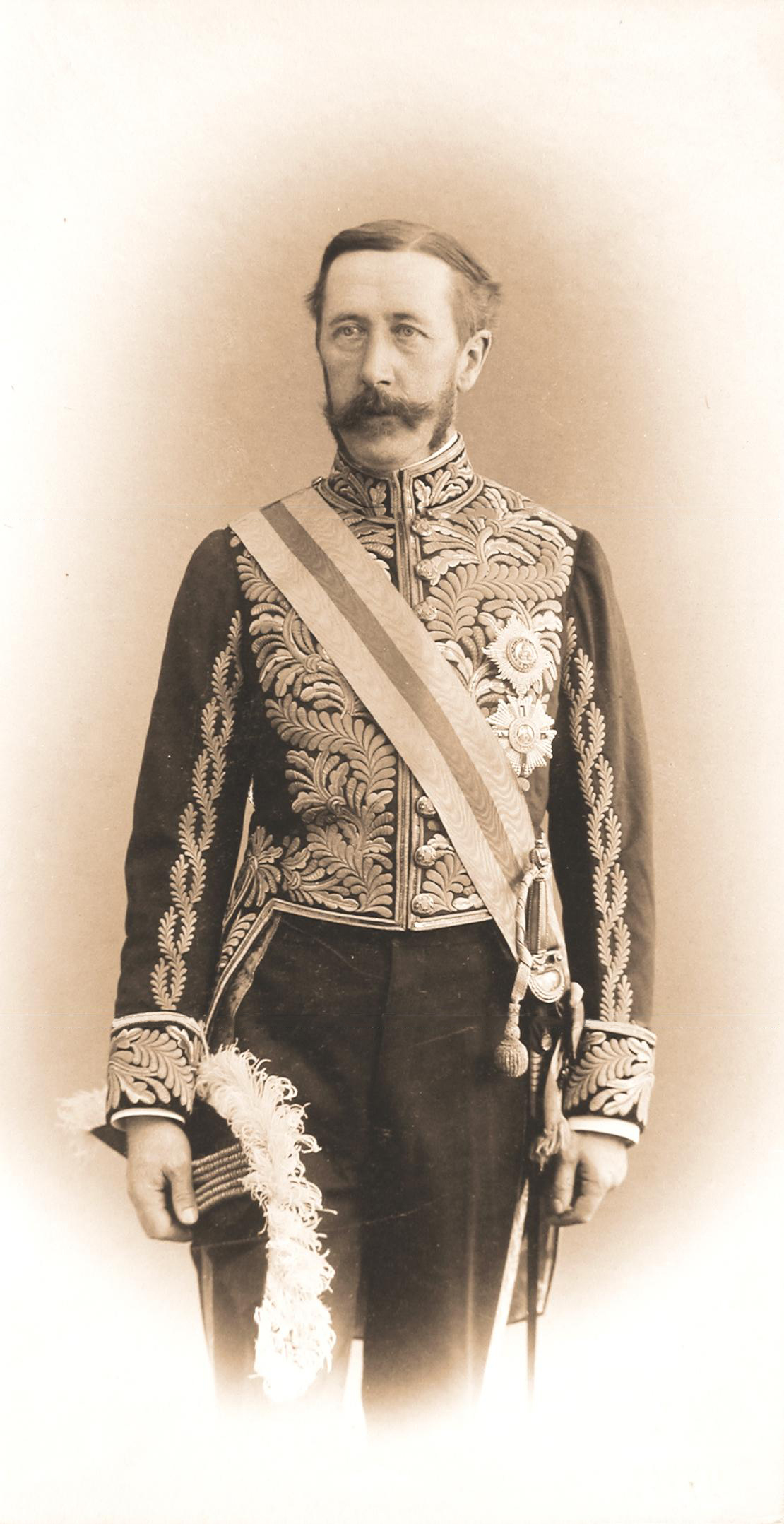 Nicholas Roderick O'Conor. Russia, Saint-Petersburg, 1895-1898